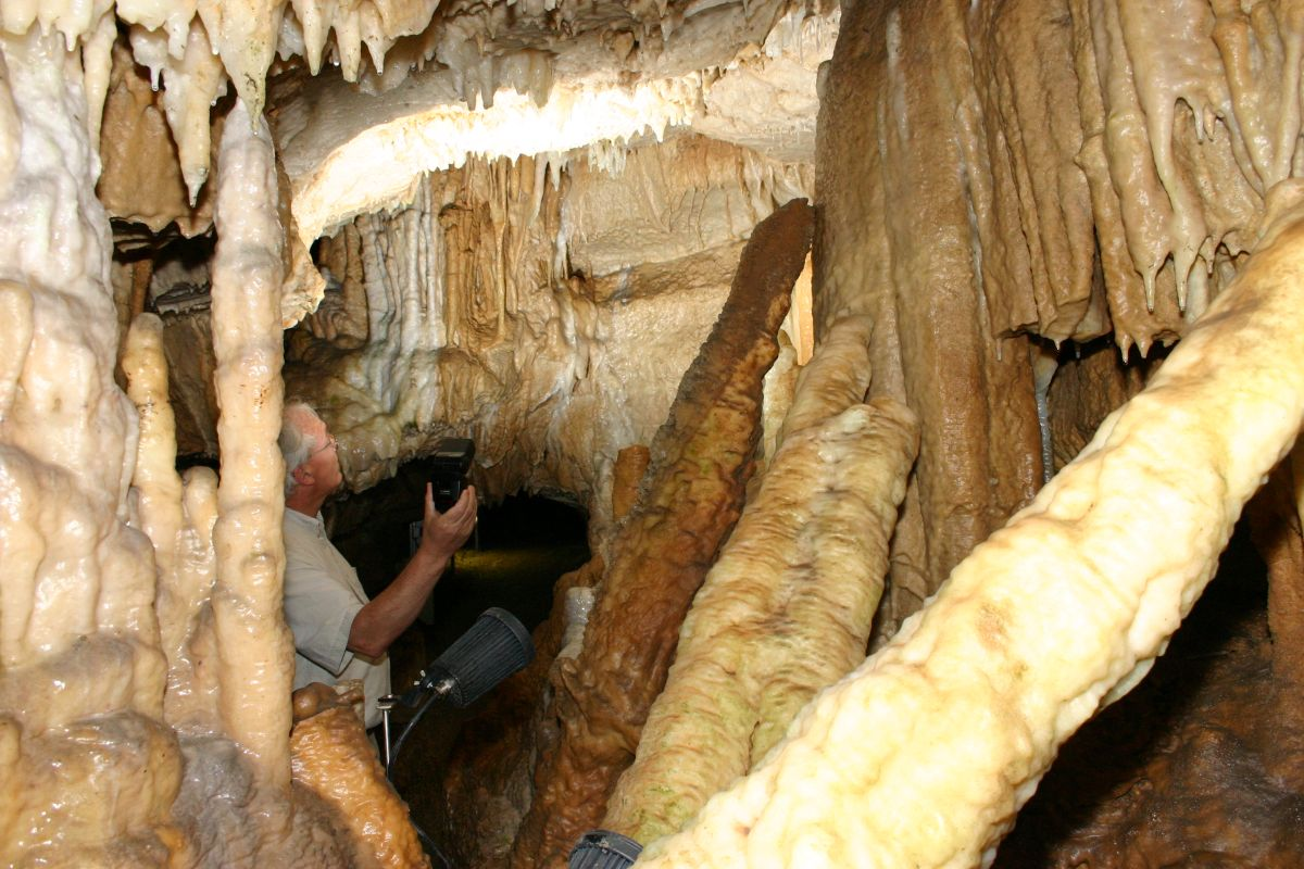 Binghöhle bei Streitberg